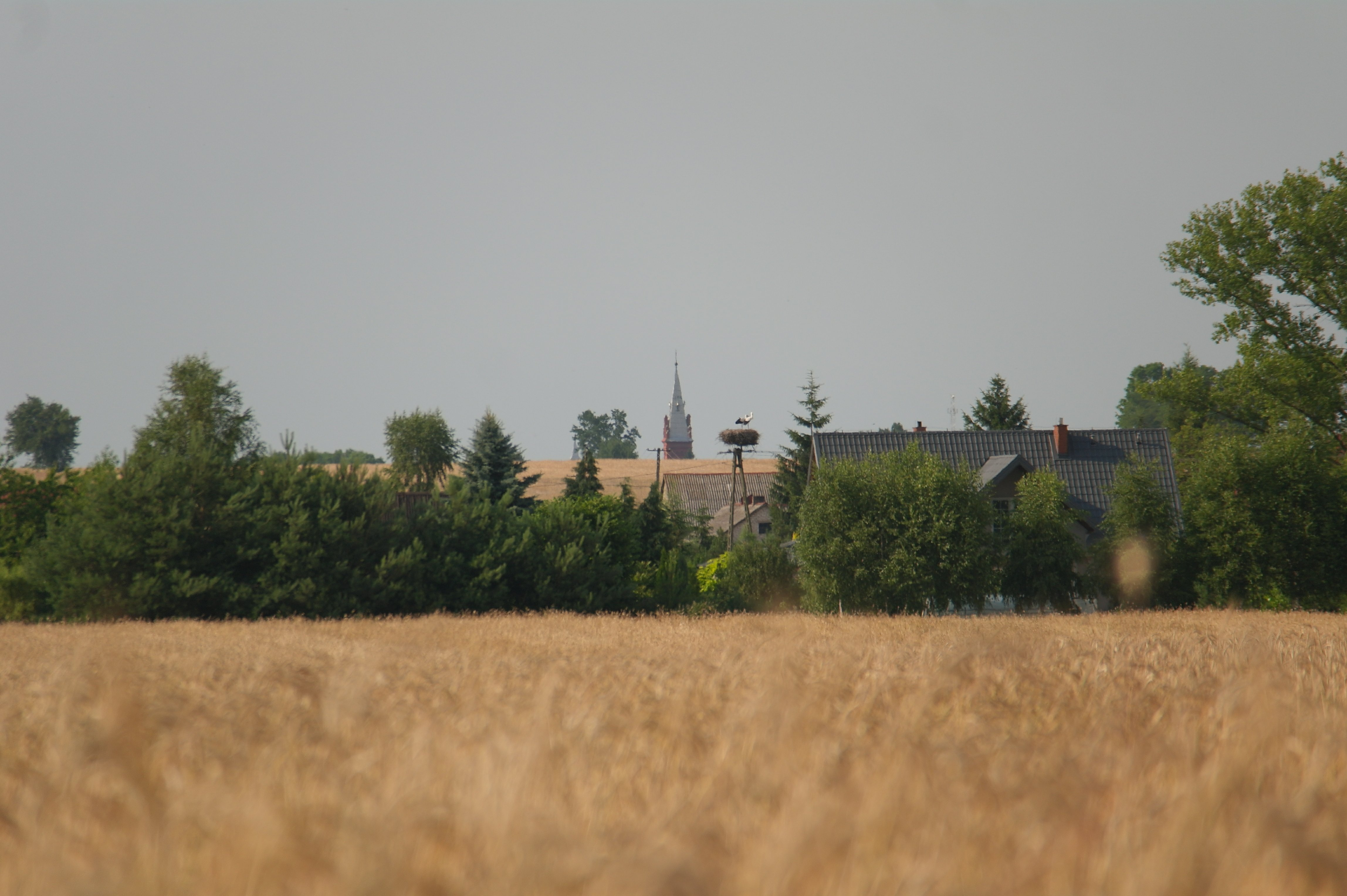 Gniazdo bociana białego w Kołoszynie